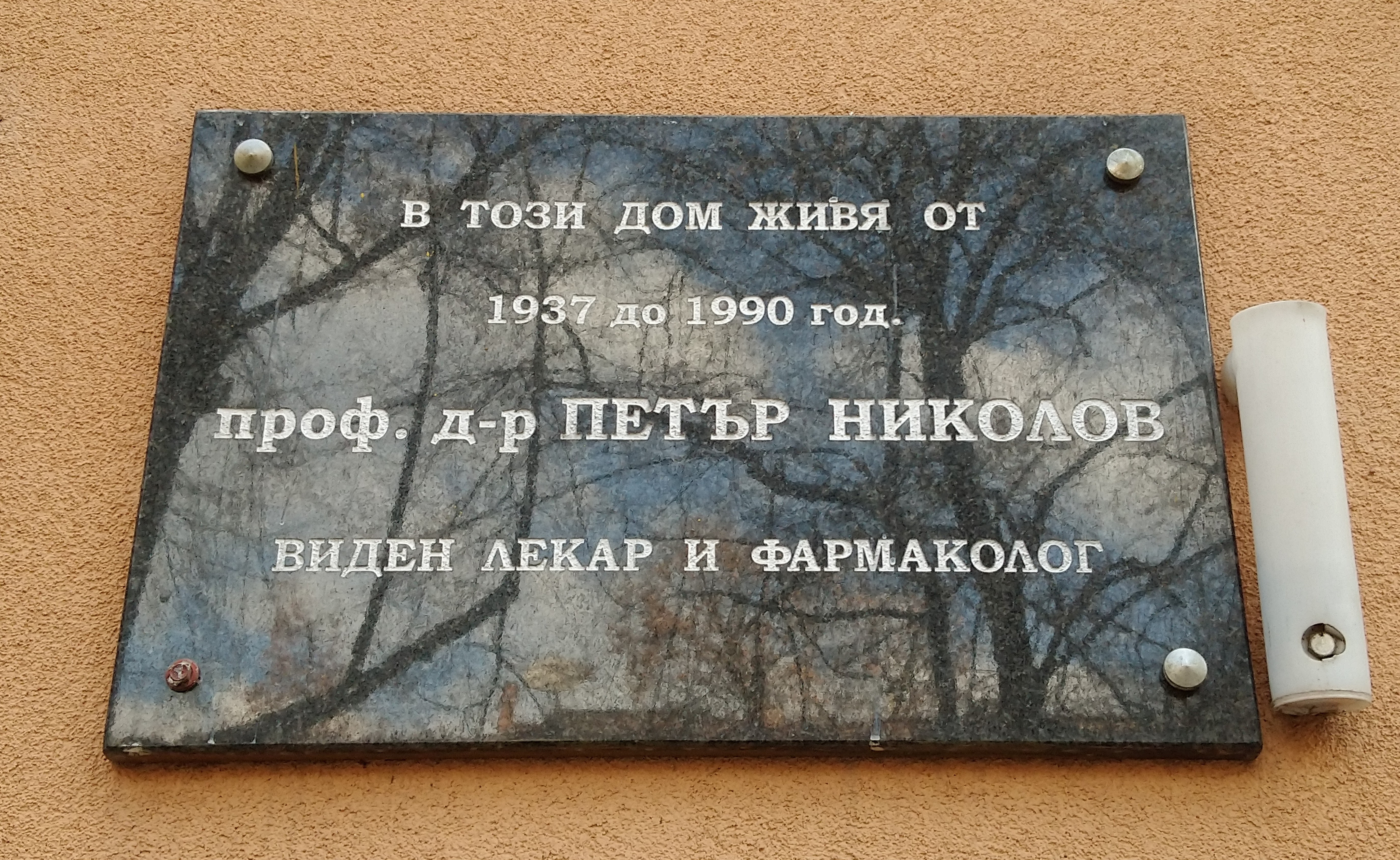 Паметна плоча на фармаколога д-р Петър Николов, ул. Райко Даскалов 3, София